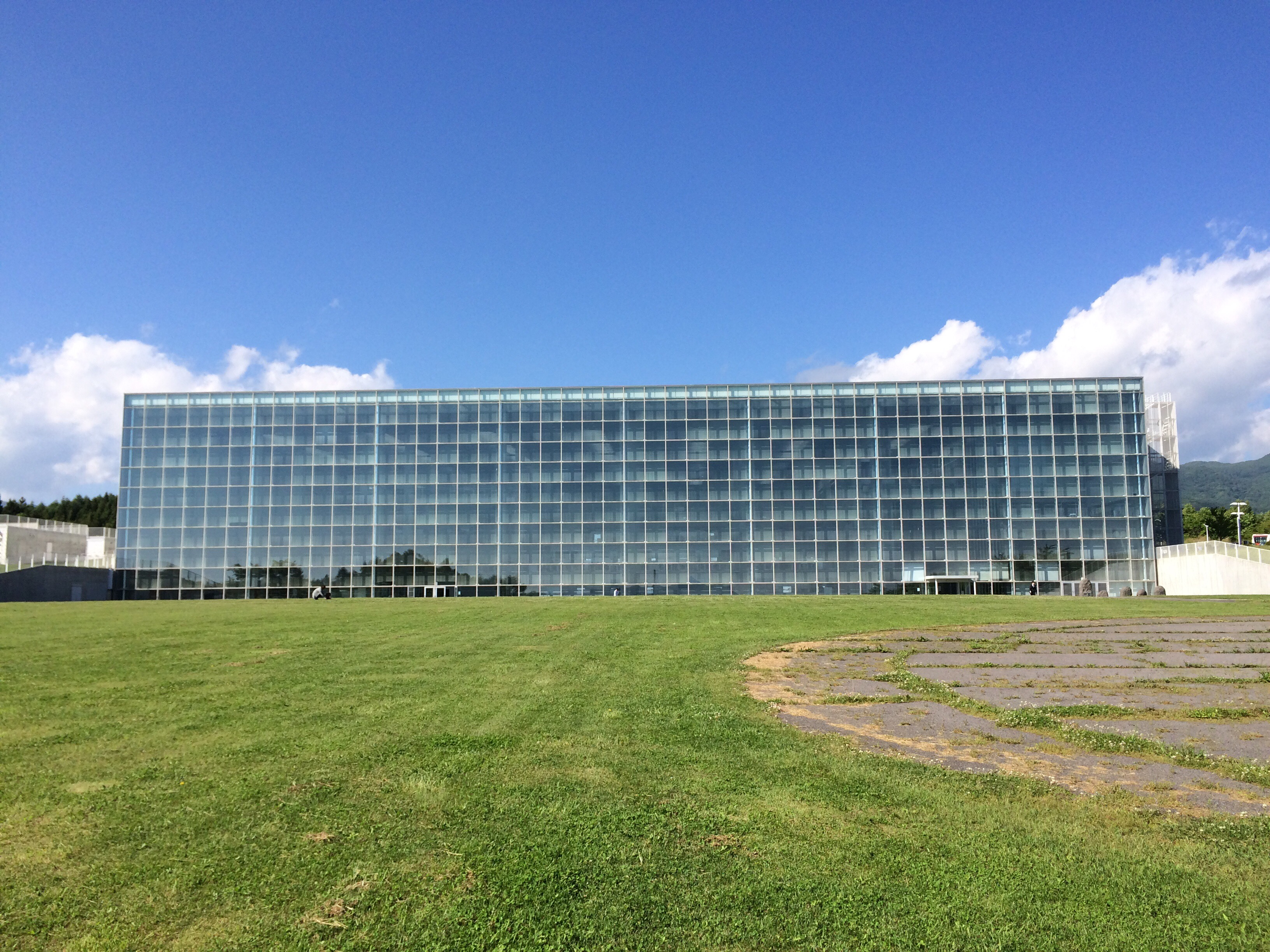 公立はこだて未来大学